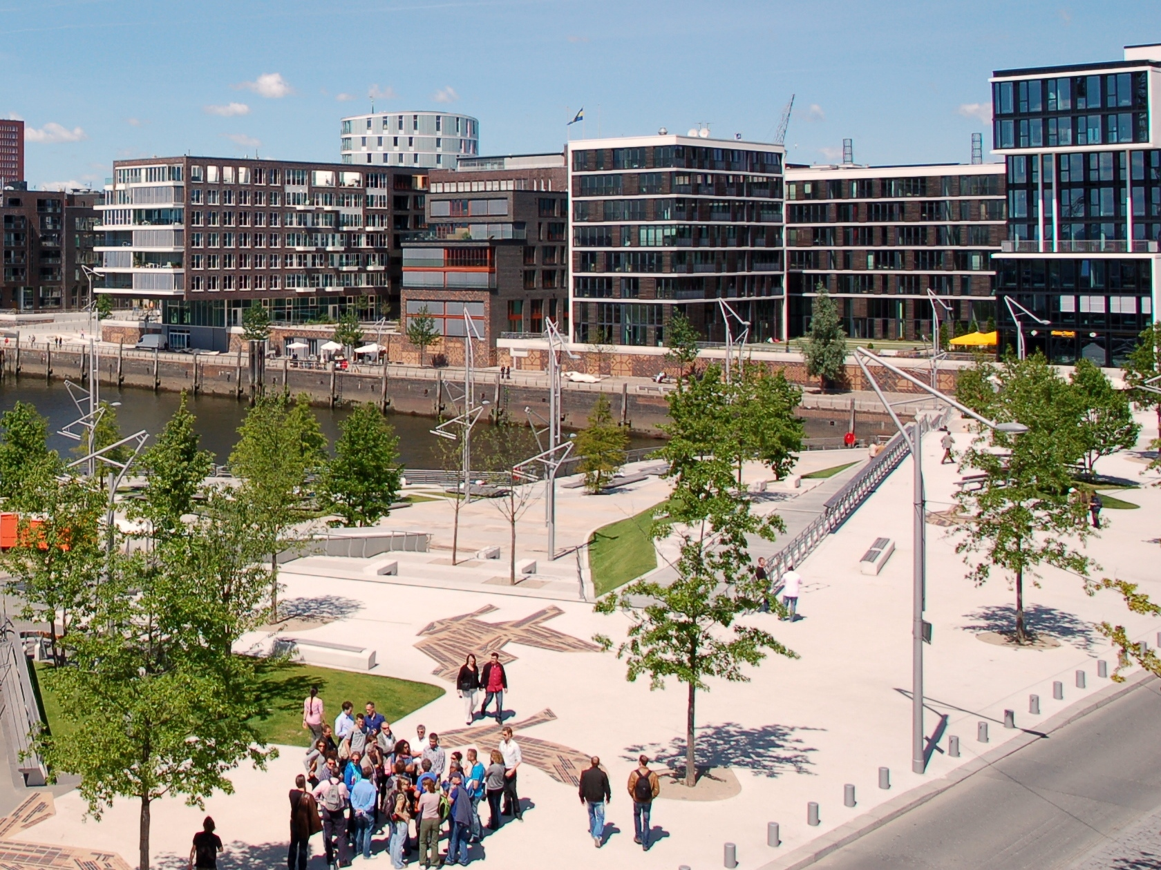 Marco-Polo-Terrassen Hamburg